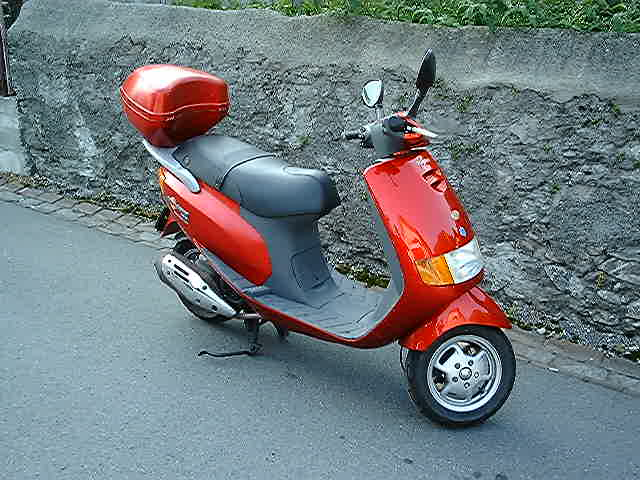 Sfera RST, b.j 1997